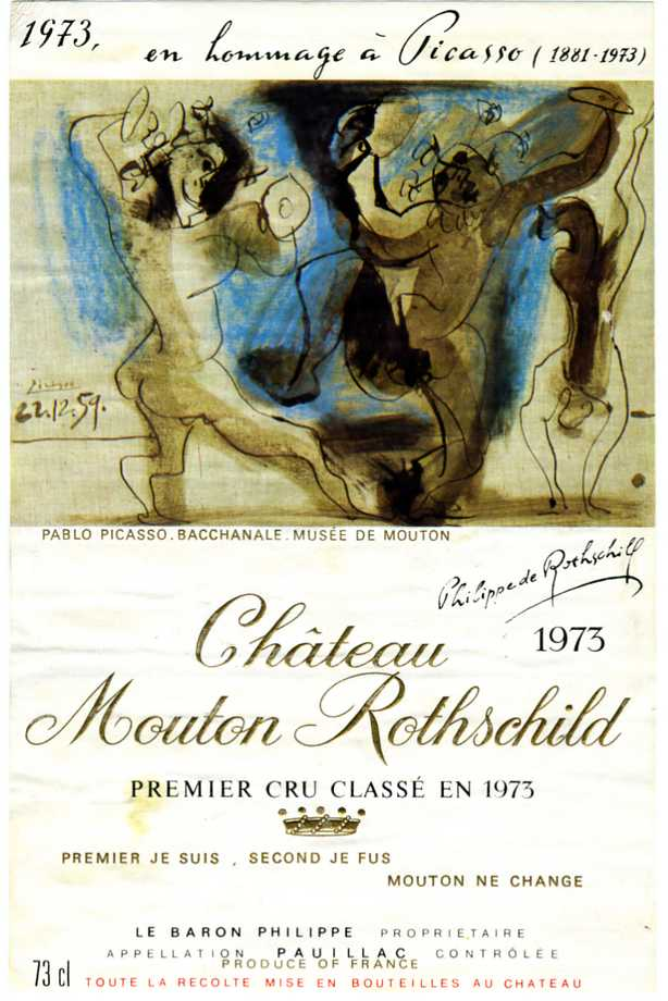 Etiquette Mouton Roth.1973.jpg